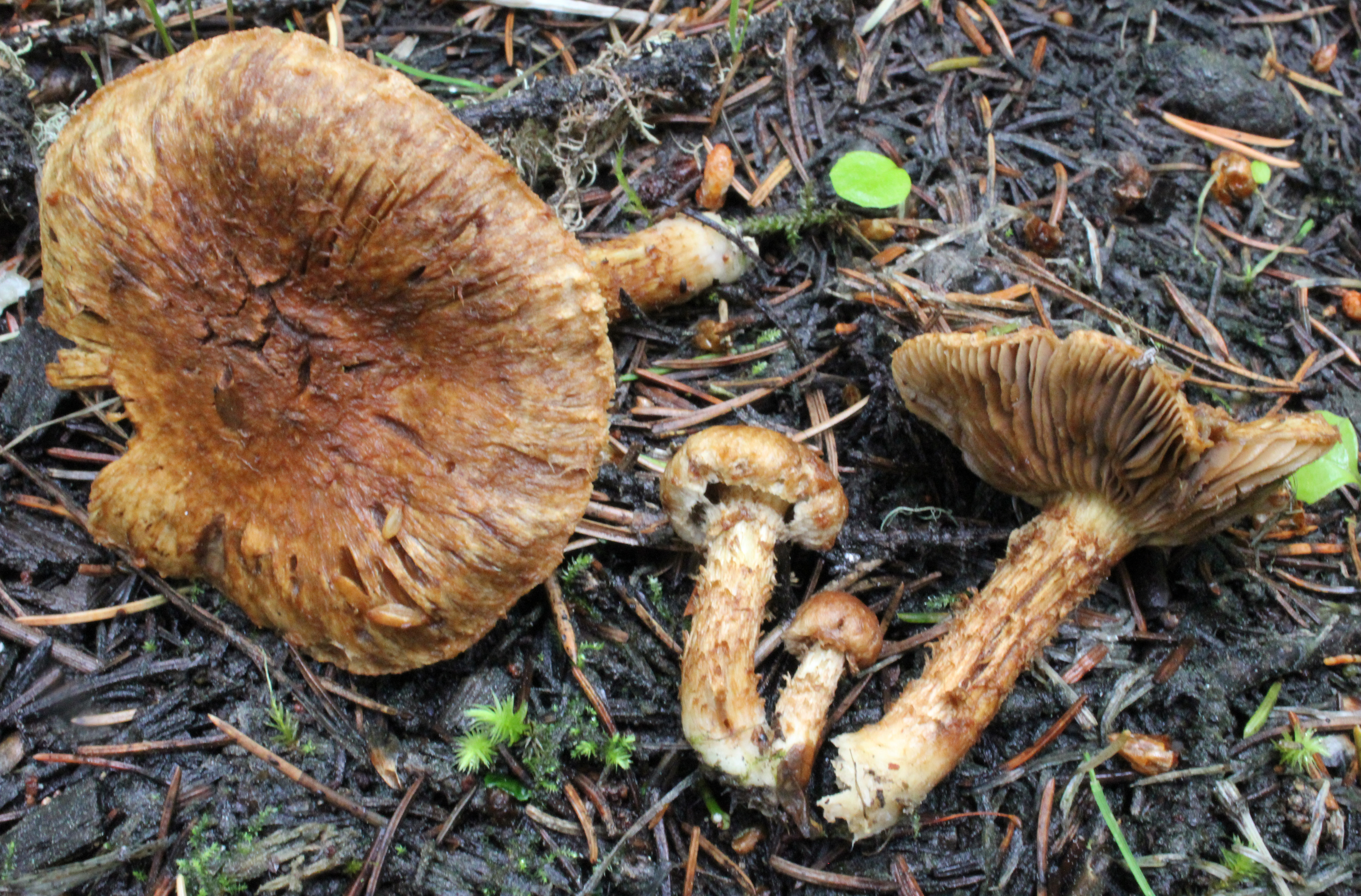 Inocybe terrigena (Fr.) Kühner